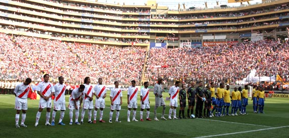 seleccion peruana en las eliminatorias 2007